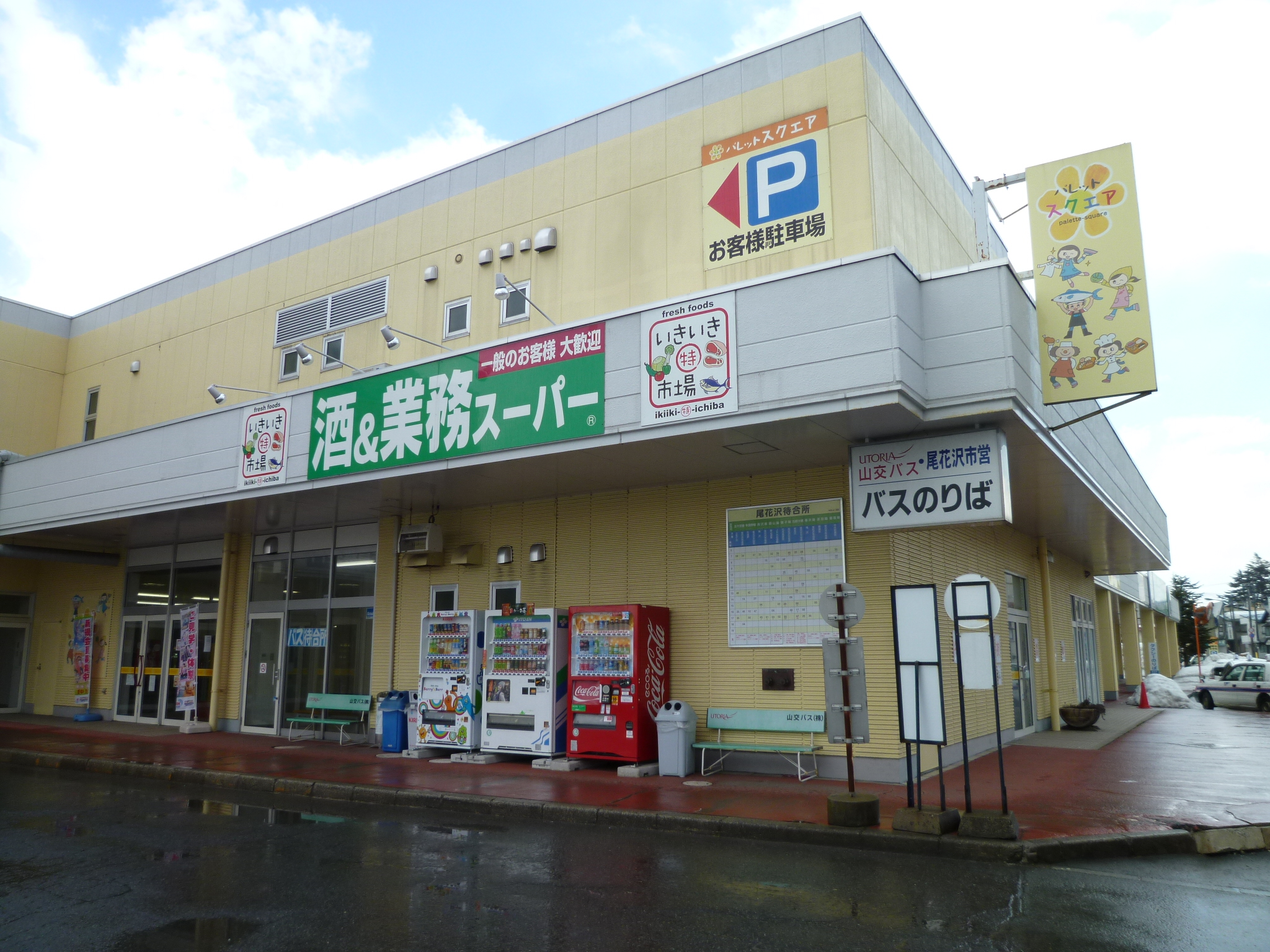 尾花沢バスターミナル。山交バス及び市営バスの待合所。山形県尾花沢市上町に所在。 かつての山形交通尾花沢線尾花沢駅跡地。